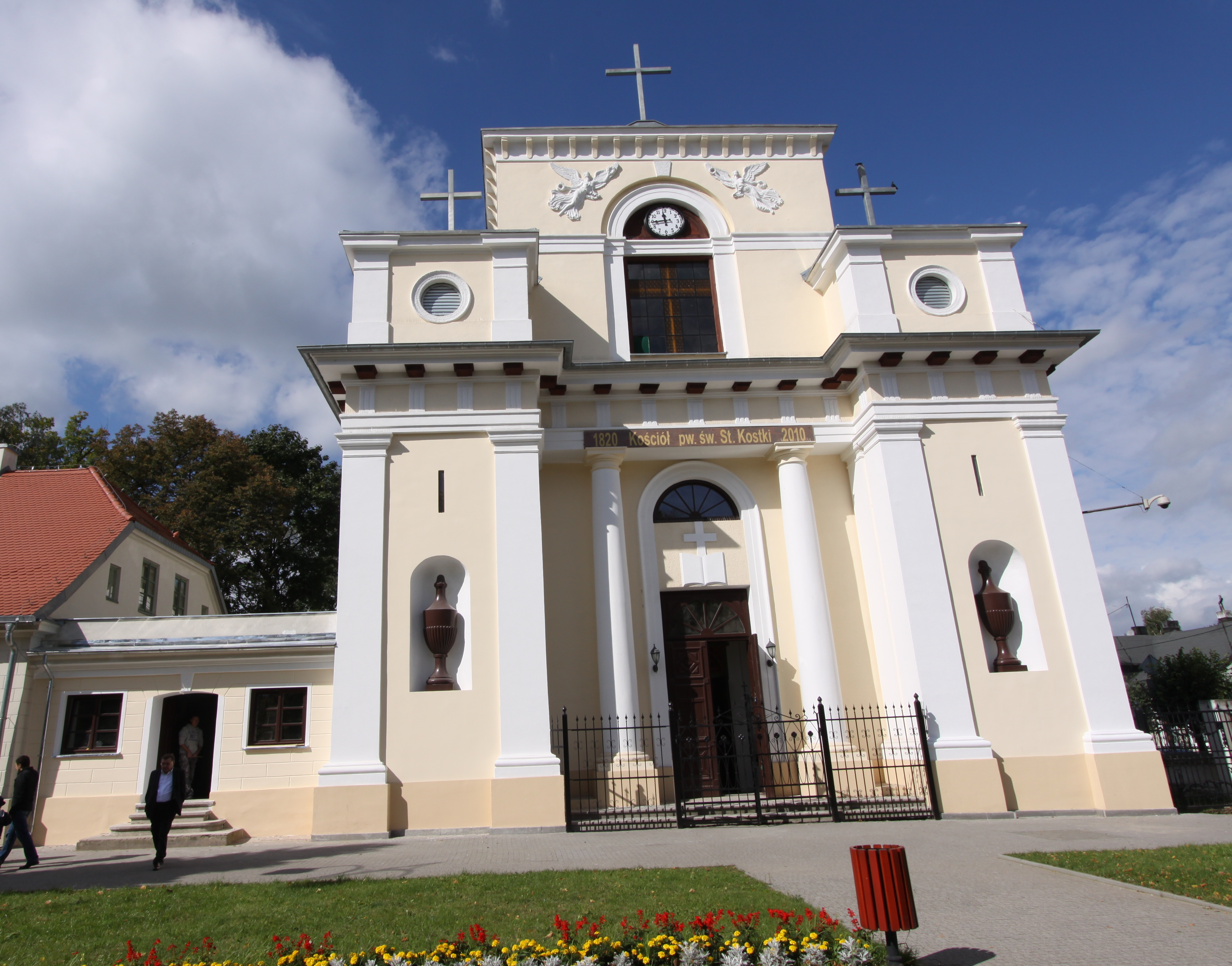 Aleksandrów Łódzki, kościół par. pw. św. Stanisława Kostki, pocz. XIX